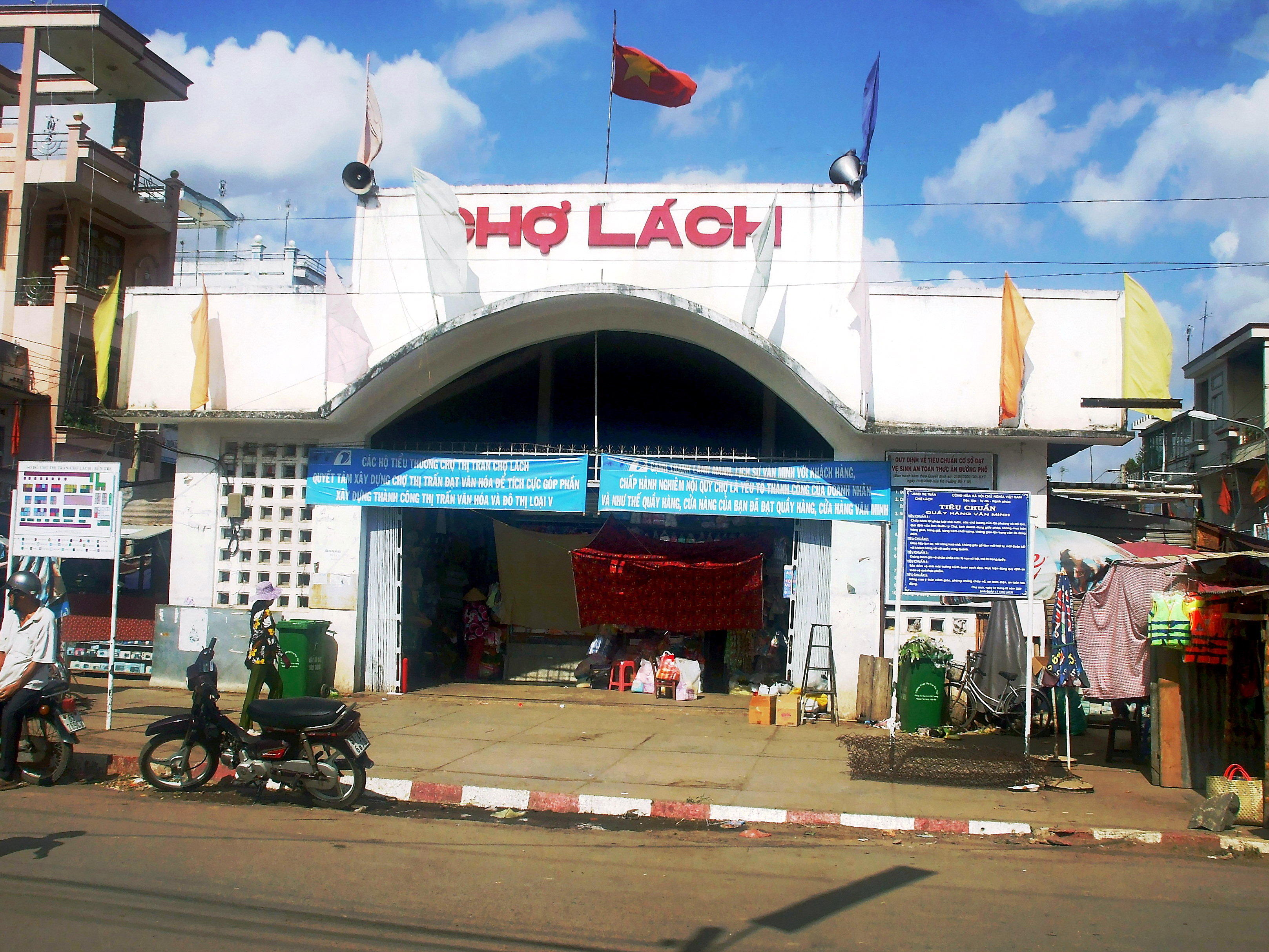 Chợ thị trấn Chợ Lách (Bến Tre, Việt Nam)